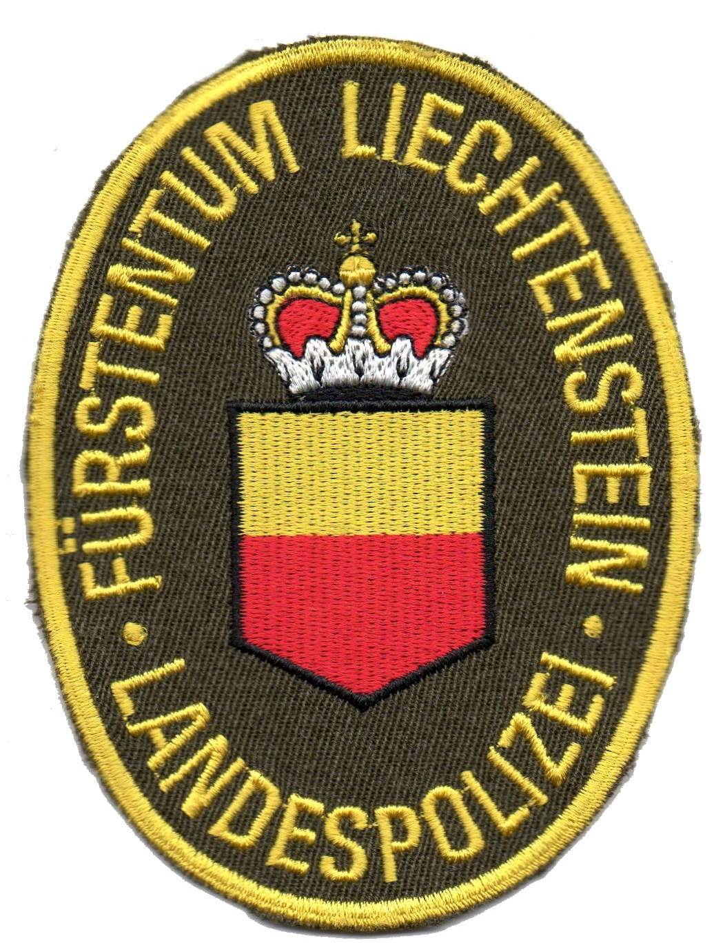 Ärmelabzeichen der Landespolizei der Fürstentums Liechtenstein.